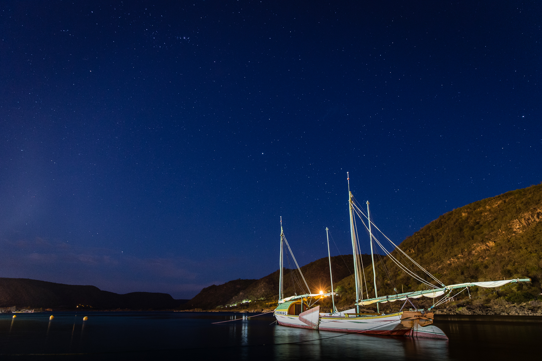 Rio Sao Francisco, Piranhas, Alagoas, Brazil For more photos please visit